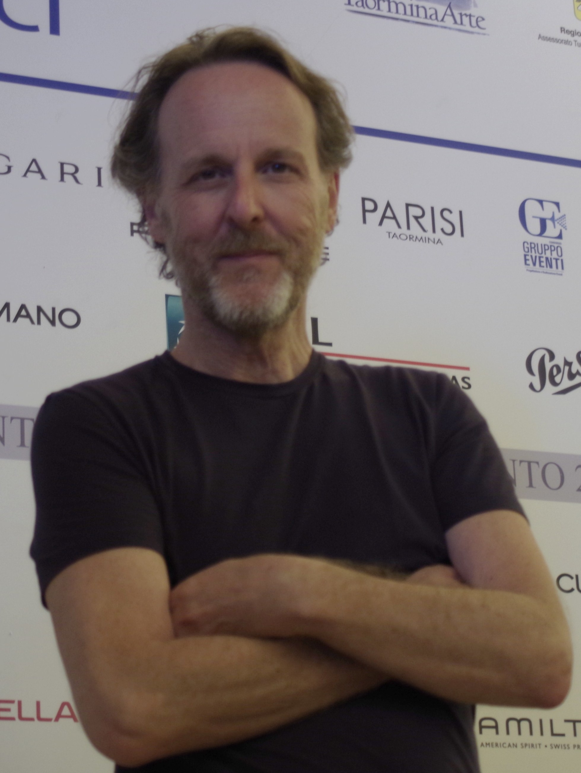 francesco bruni